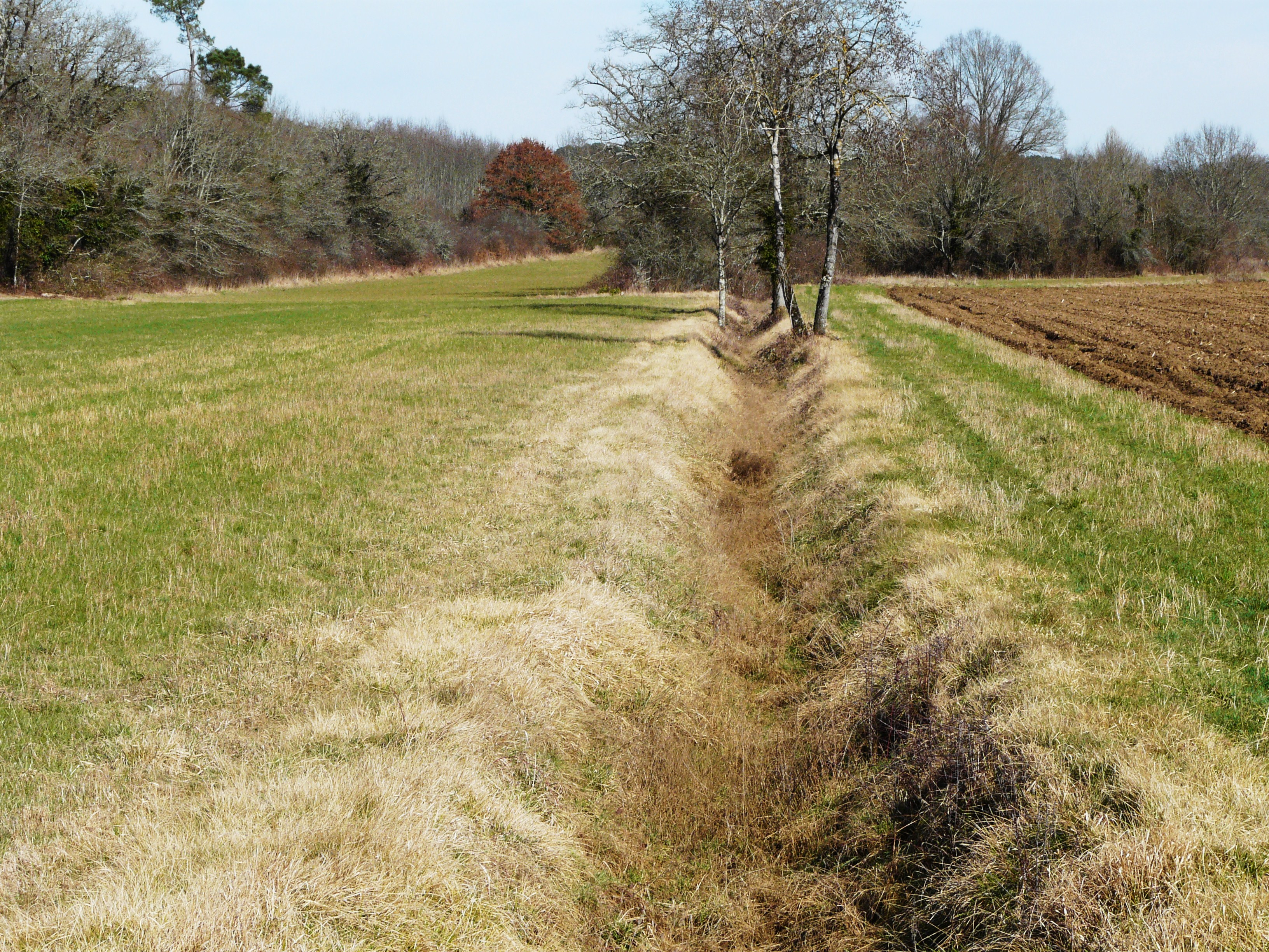 Le cours asséché de la Beauronne vu depuis la route départementale 74, Ligueux, Dordogne, France